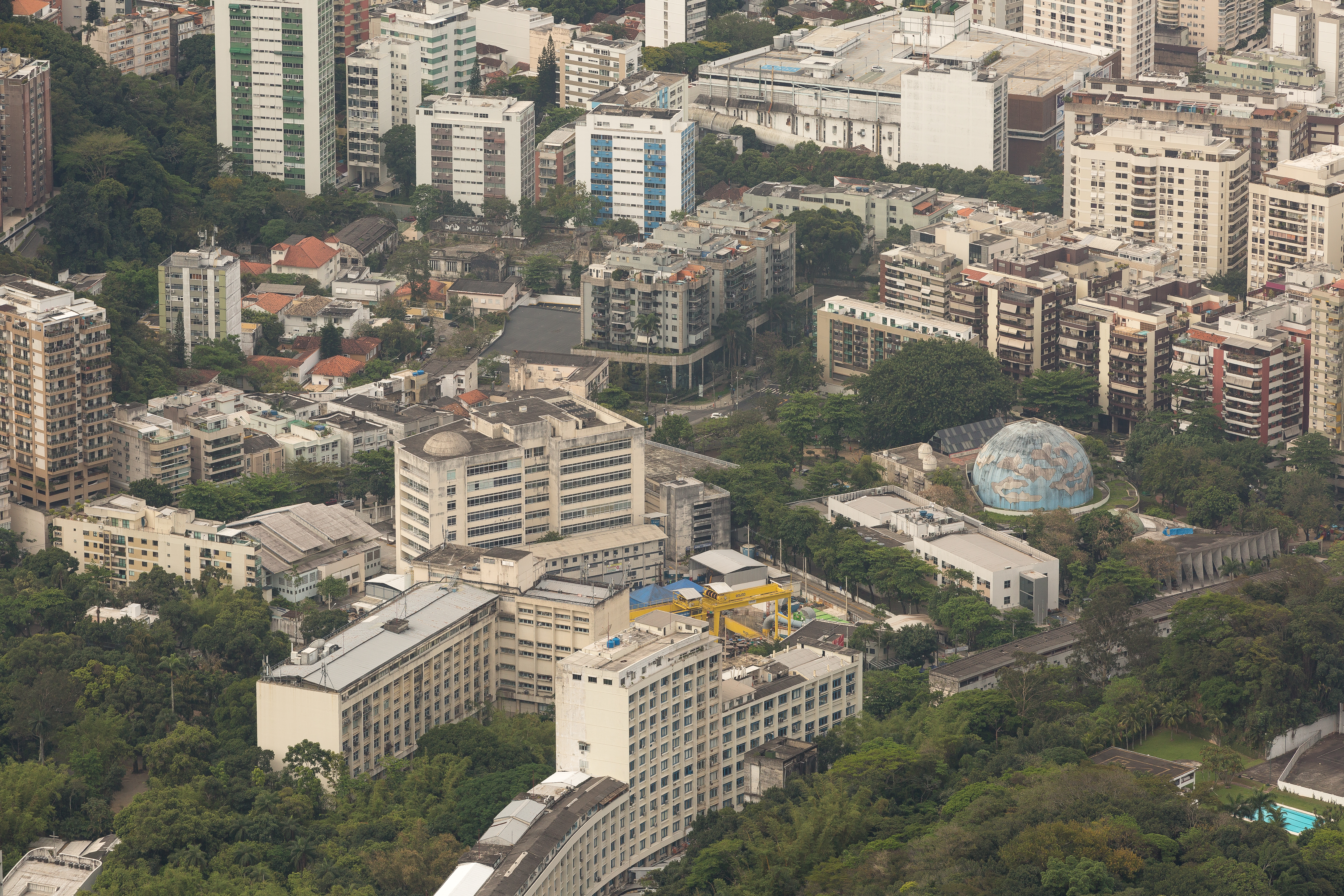 Vista aérea do bairro da Gávea com o Planetário da cidade do Rio de Janeiro.